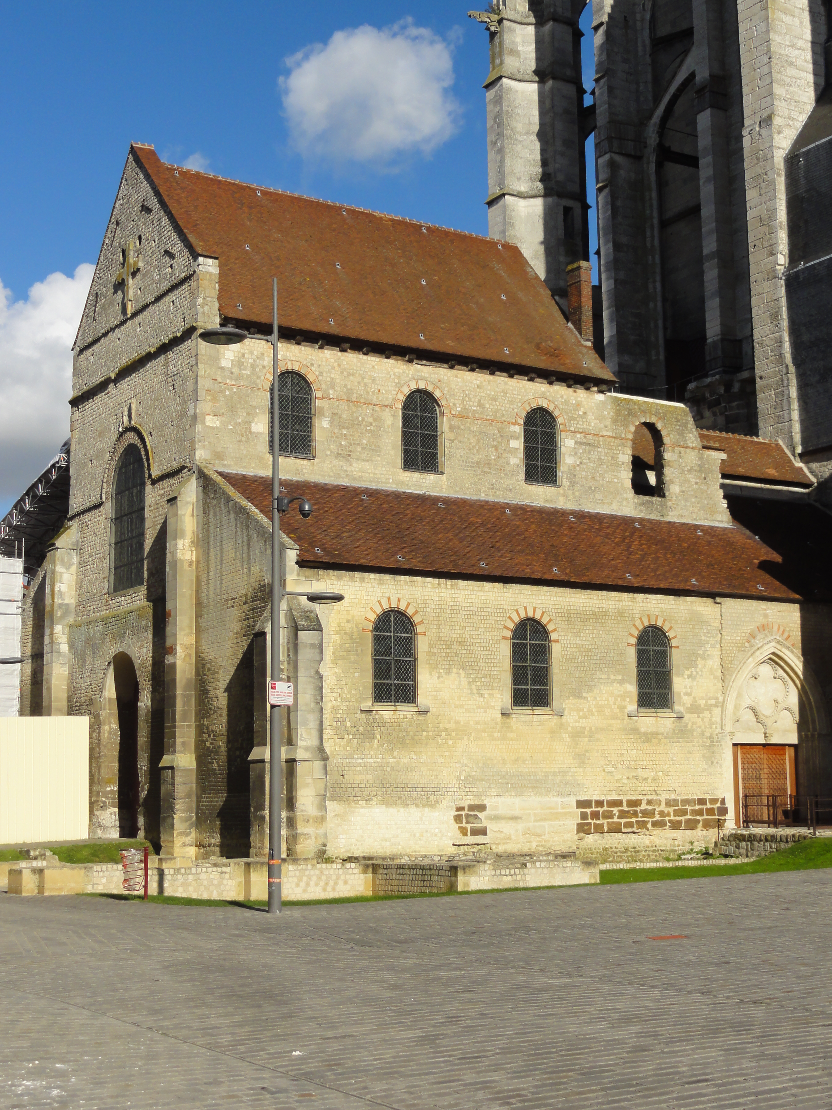 Élévation sud.